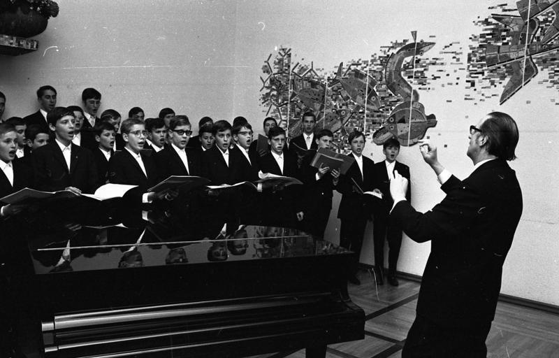 Konzert der Stuttgarter Hymnus-Chorknaben in der Landesvertretung Baden Württemberg